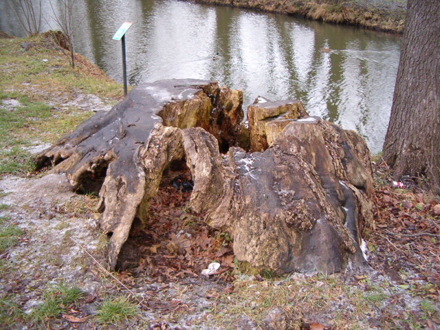 Löwenruh' pargi põlispuu. Asub Linnu tee ääres. Tallinn